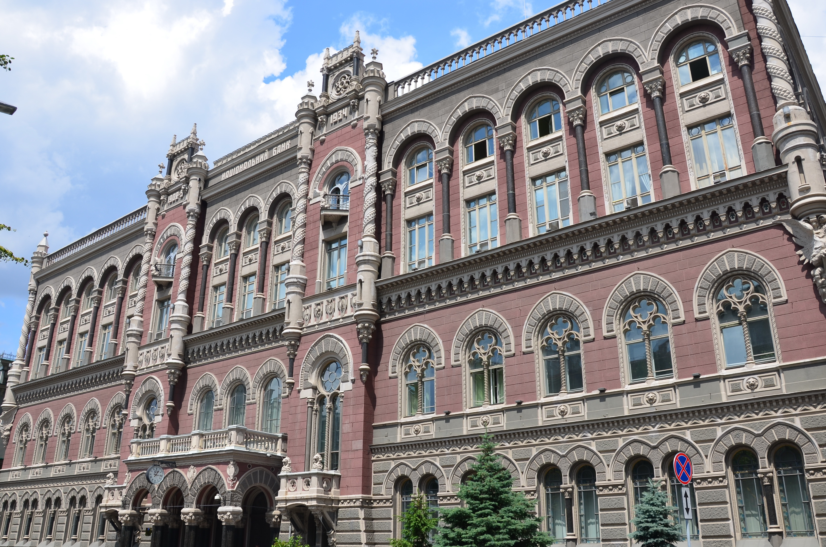 Київ, Інститутська, 9а. Будинок Київської контори Державного банку - пам'ятка архітектури.